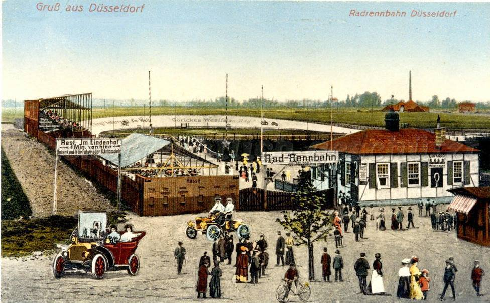 Radrennbahn in Düsseldorf-Lörick, ca. 1907 bis 1914